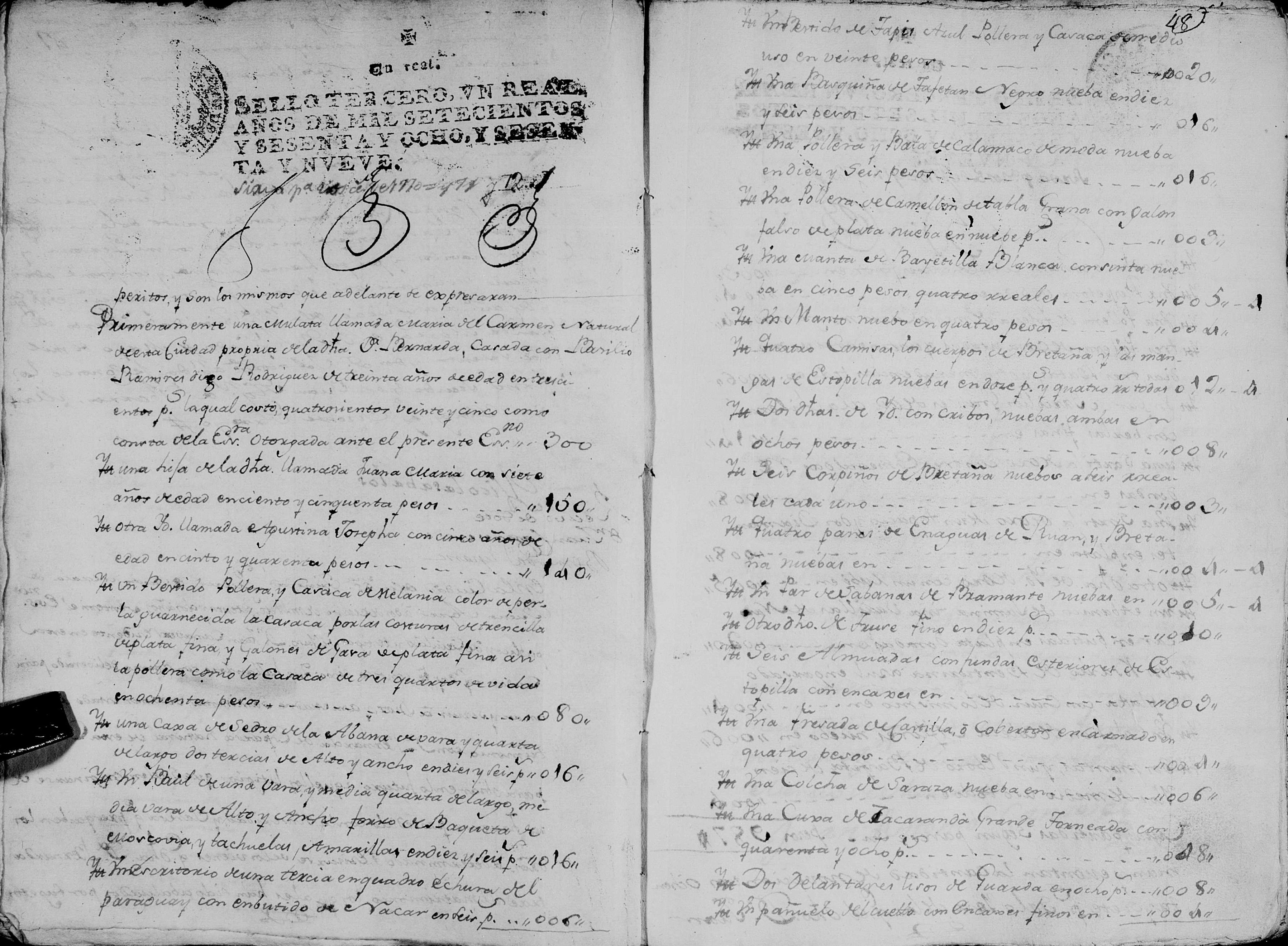 Acuerdo matrimonial entre Juan Antonio Canavero y Catalina Bernarda Esparza.